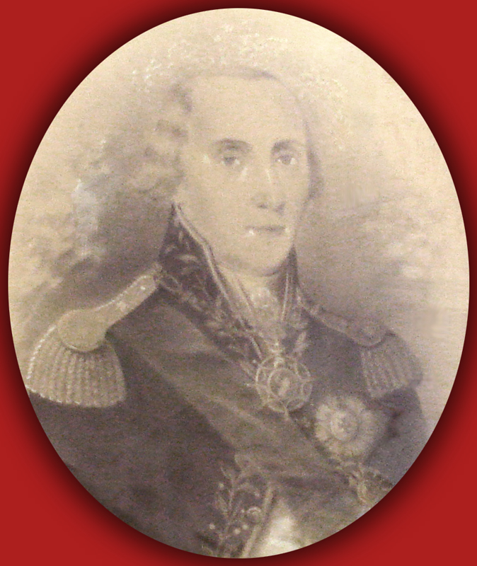 Retrato de José Marcelino de Figueiredo (Manoel Jorge Gomes de Sepúlveda por bautizo), Século XIX, crayon e pastel sobre papel. Museu Joaquim Felizardo, Porto Alegre. Autor desconhecido.